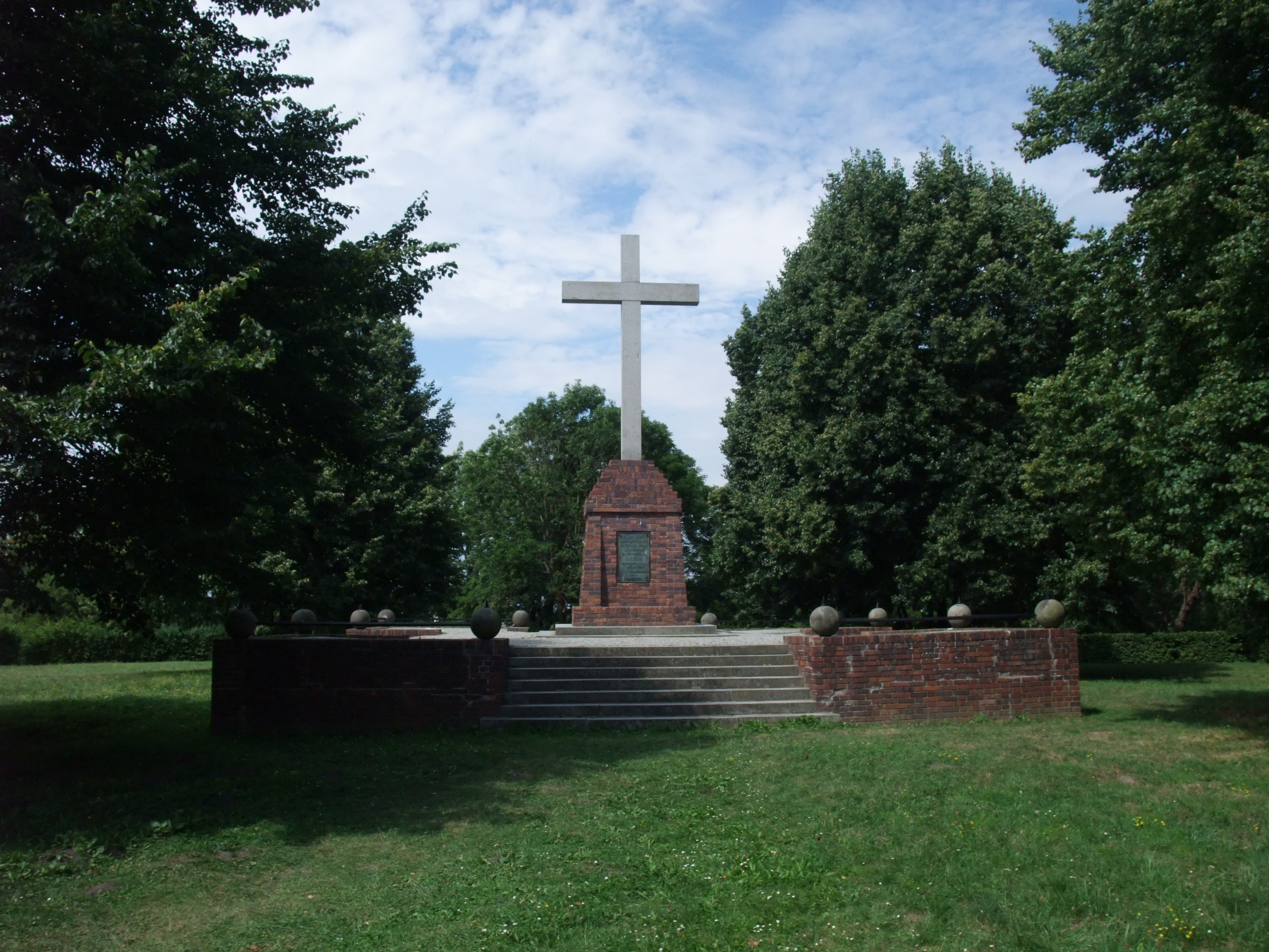 Christianisierungsdenkmal auf dem Schlossberg in der Stadt Usedom, Deutschland